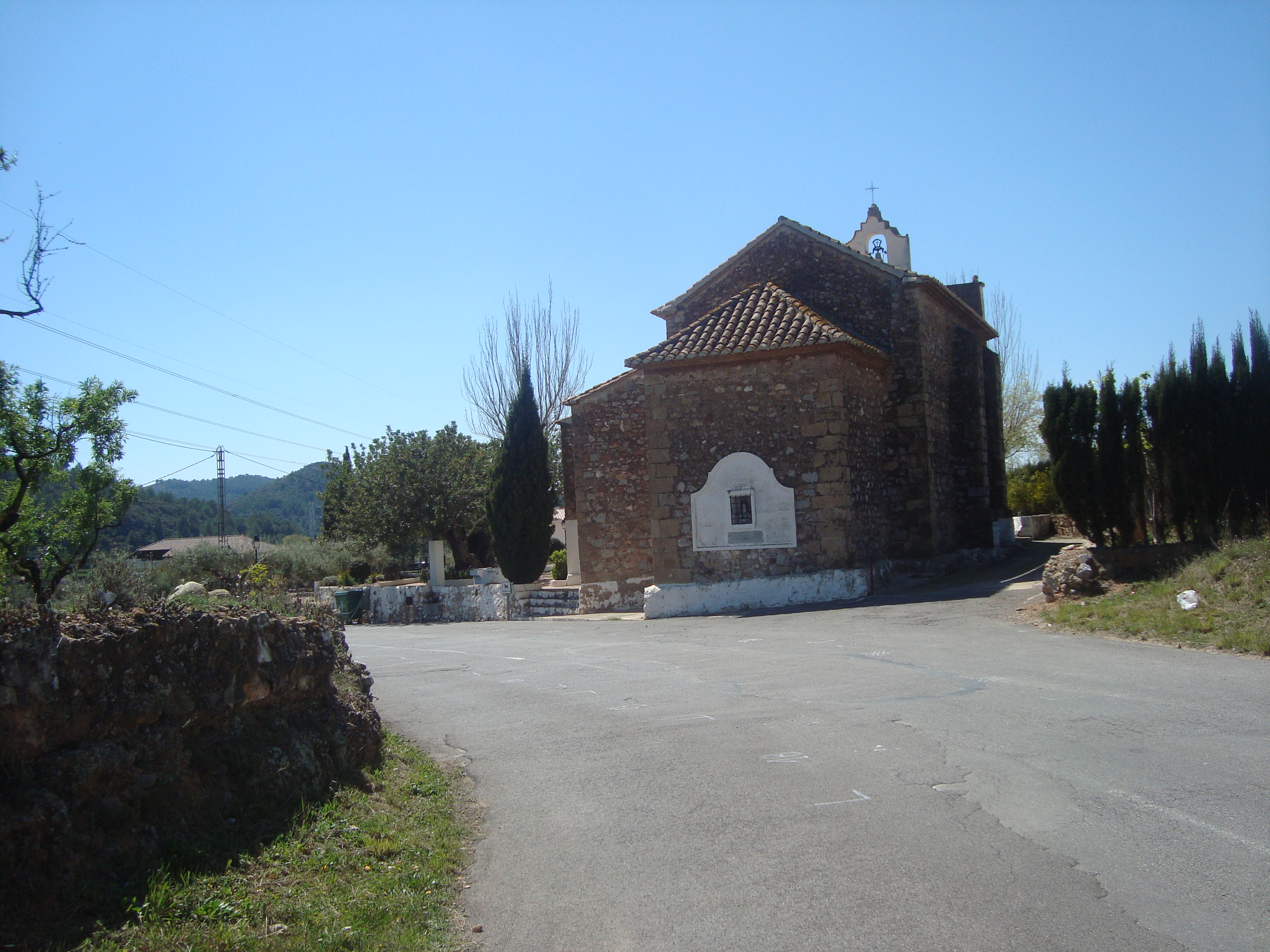 Ermita de Sant Vicent Ferrer (Borriol) 05.031-002.